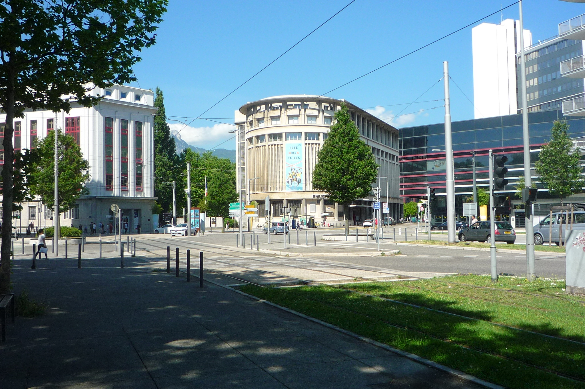 Extrémité du boulevard Jean-Pain ; Grenoble (France)